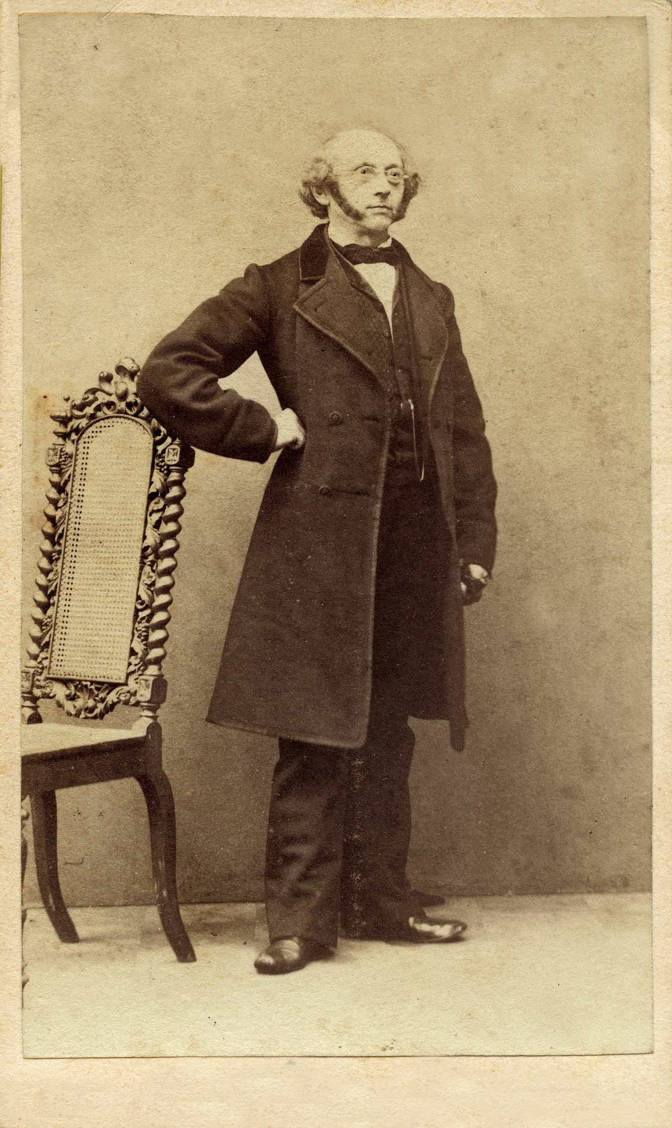 Julius Eduard Wjelan